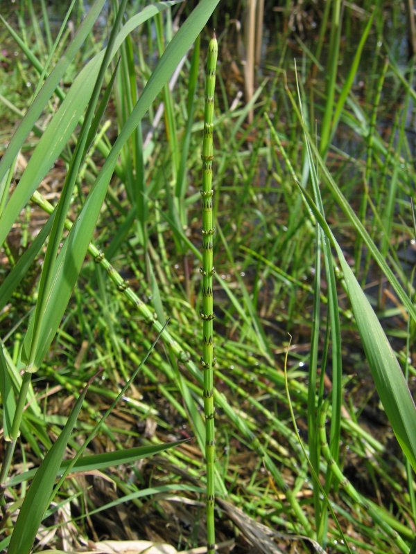 Sumpf-Schachtelhalm Equisetum palustre, Rügen